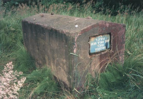 קברו של הרב חנוך העניך מאלכסנדר